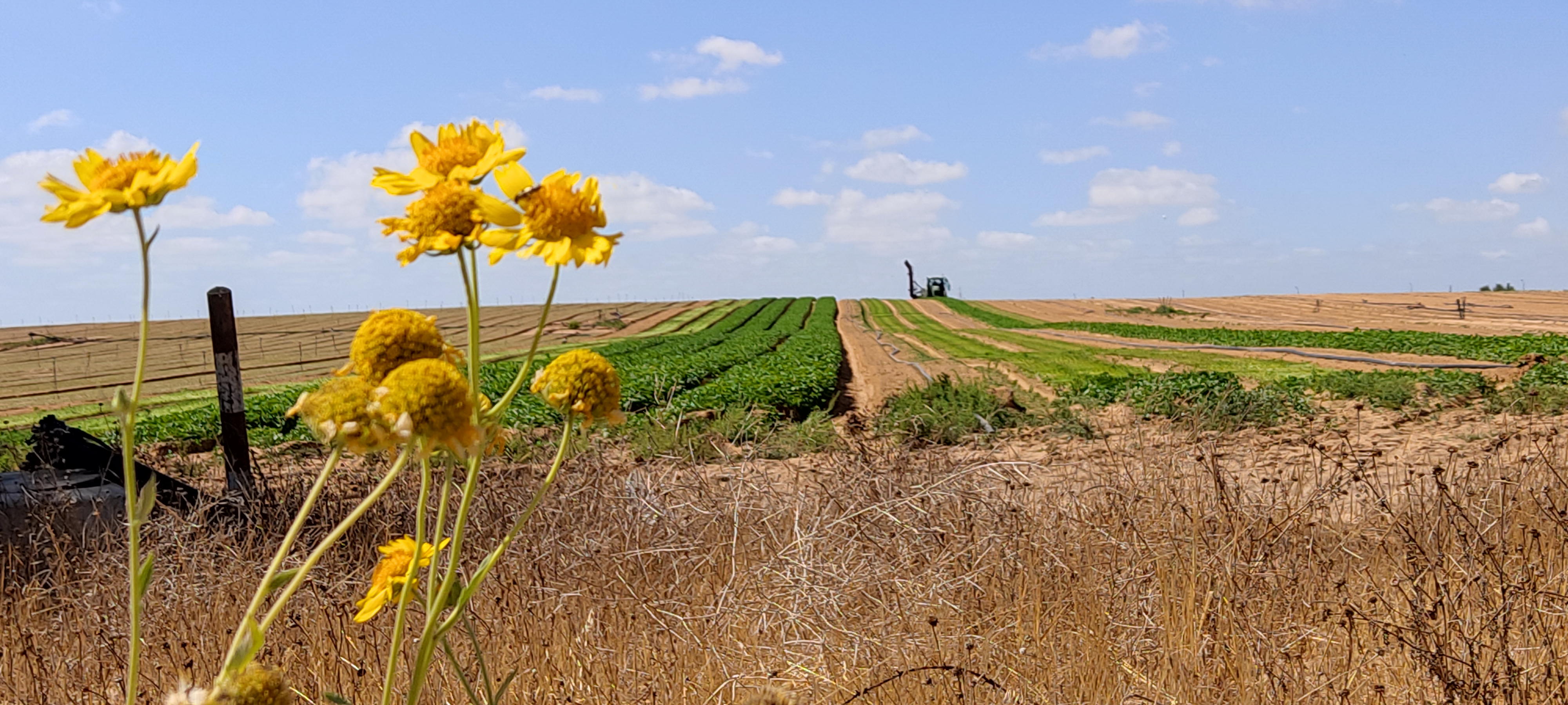 שדה במושב דקל עליו בעתיד תוקם ההרחבה הקהילתית